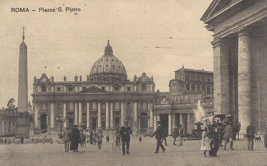 San Pietro in Vaticano